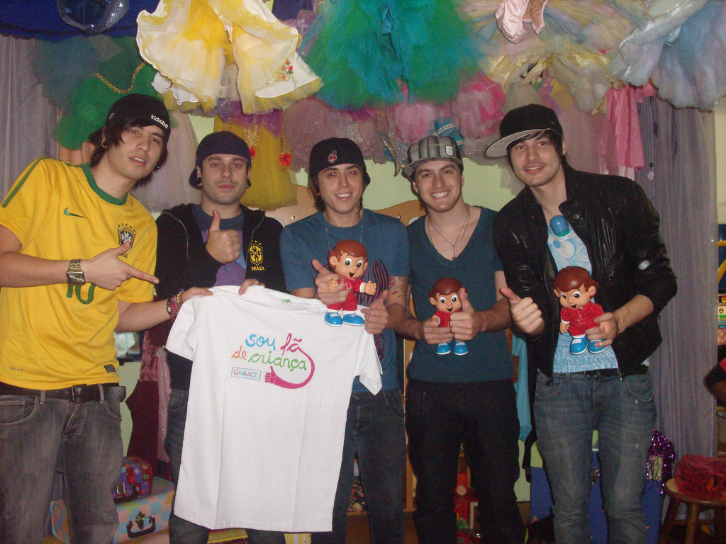 Banda Cine com Senninha no GRAACC (Grupo de Apoio ao Adolescente e à Criança com Câncer) em 2010.